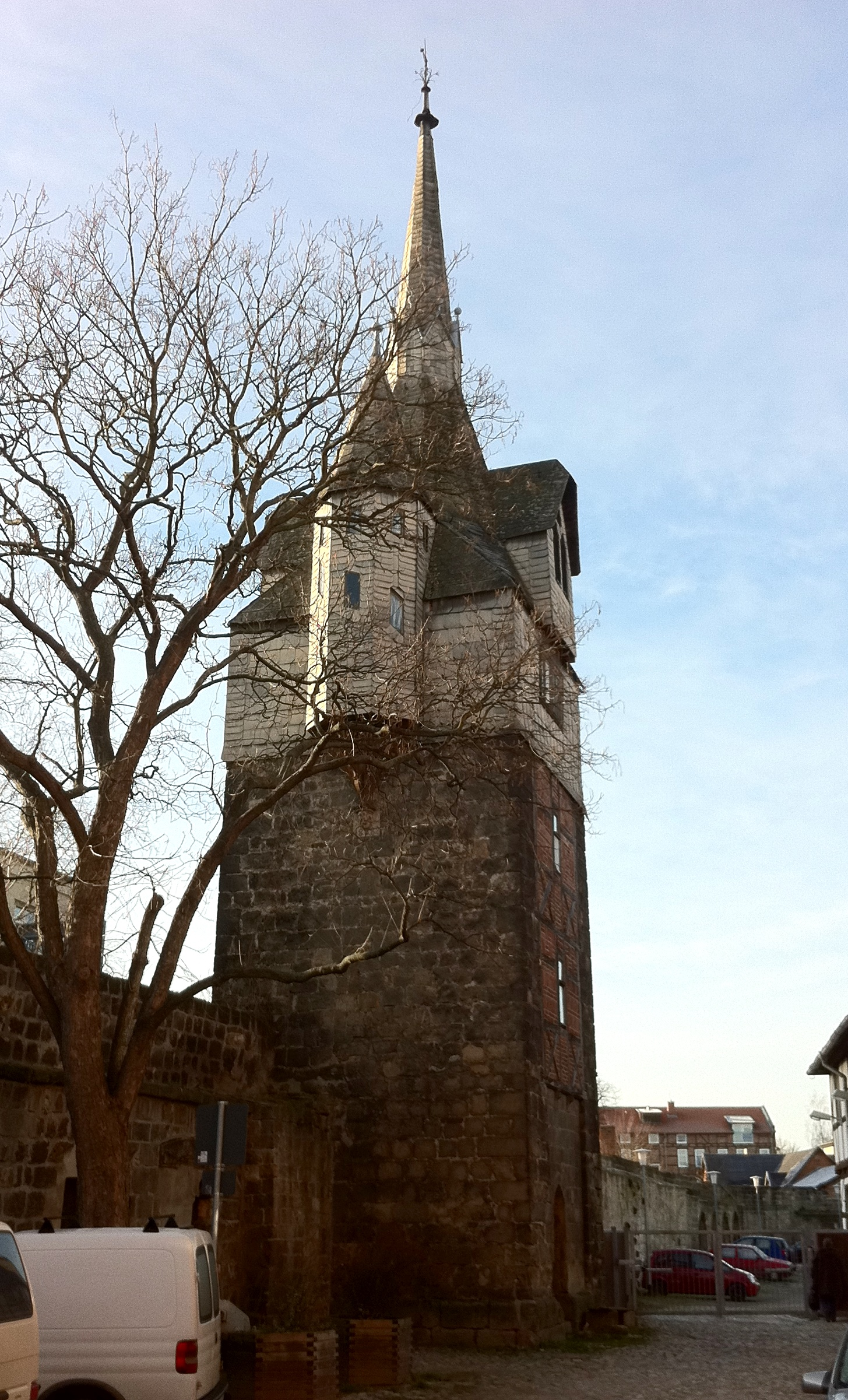 Wehrturm der Quedlinburger Stadtbefestigung, Kaiserstraße Ecke Hinter der Mauer